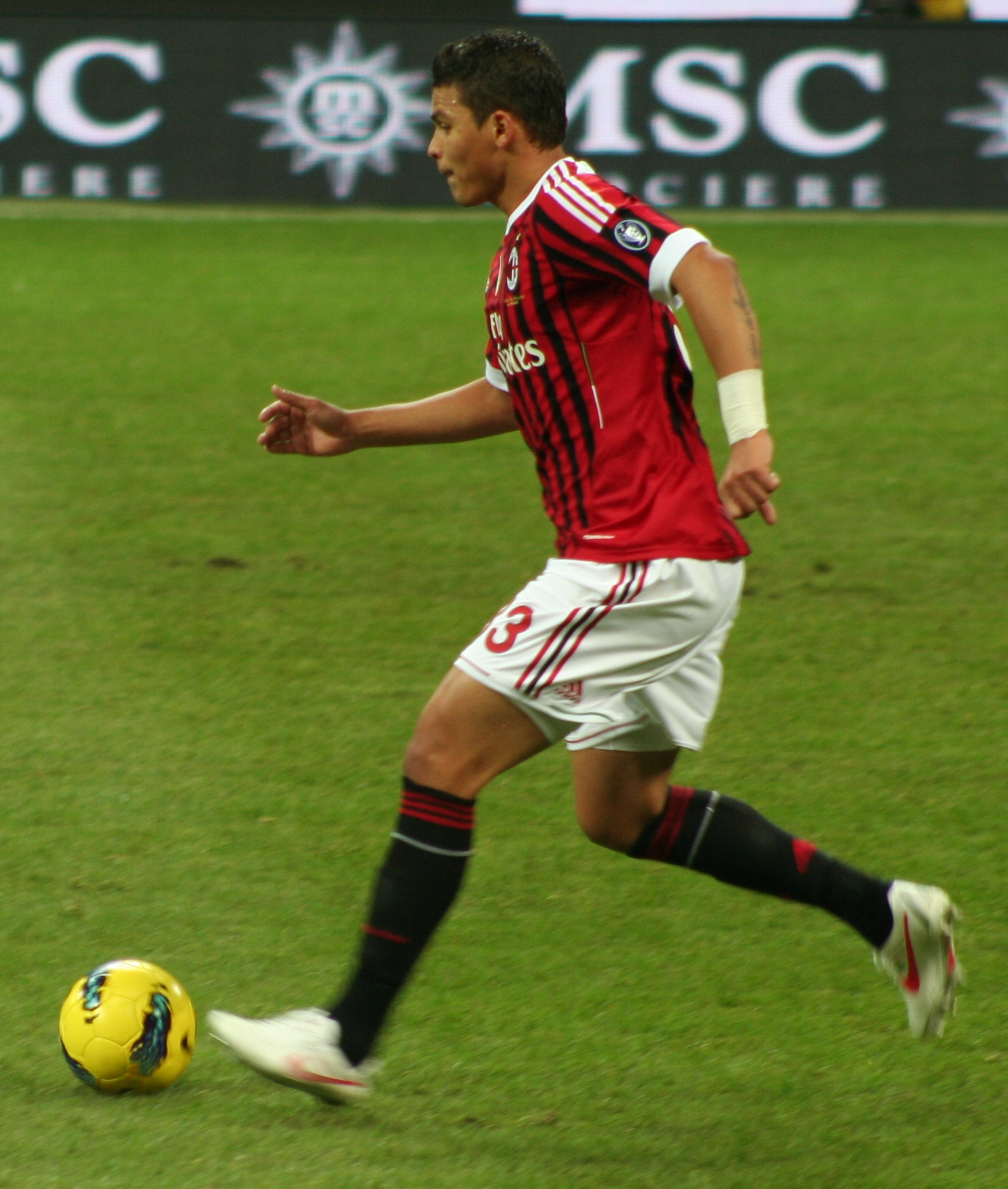 Mascotte del Milan. Partita Milan-Siena stagione 2011-2012